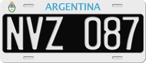 Matrícula de Argentina para todos los vehículos de uso particular, así como también para el transporte público y de cargas.